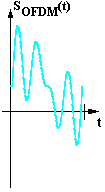 OFDM Signal im Zeitbereich Stefan Henze - GNU Free Documentation License: Vorlage:Bild-GFDL